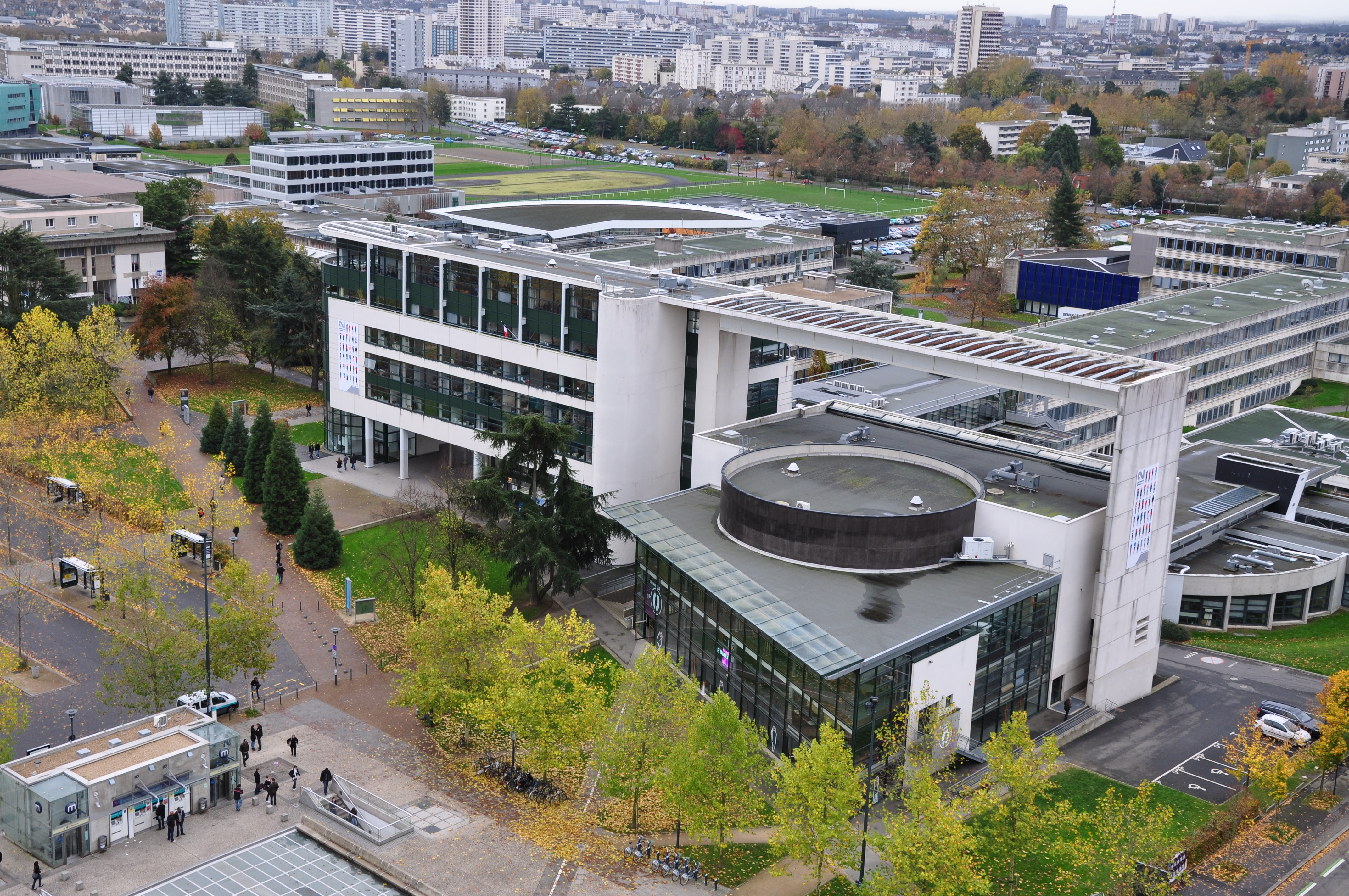 Campus de Villejean depuis le cours Kennedy, Rennes.